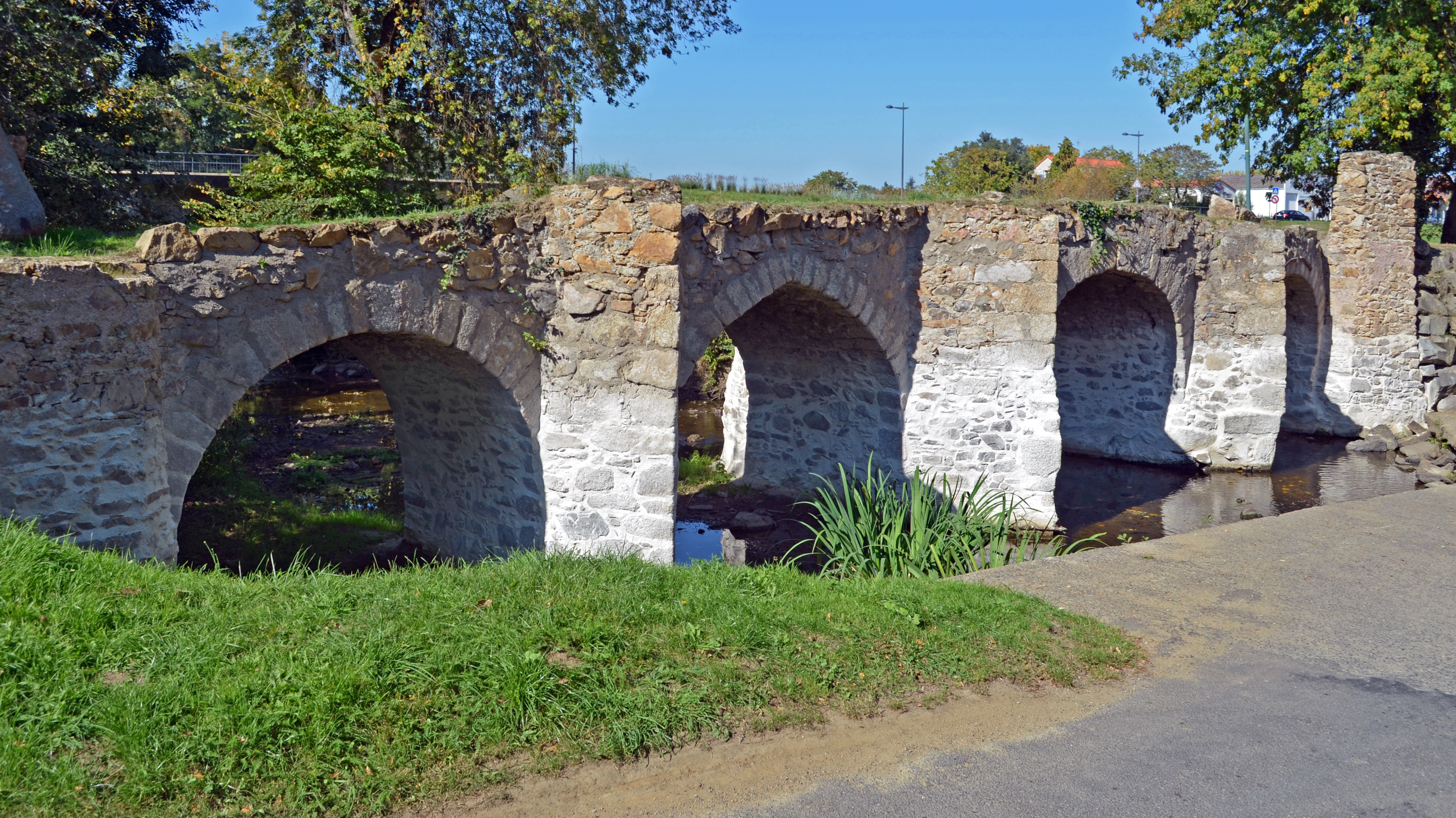 Pont romain, I°, sur la Sanguèze, Fr-44-Mouzillon.